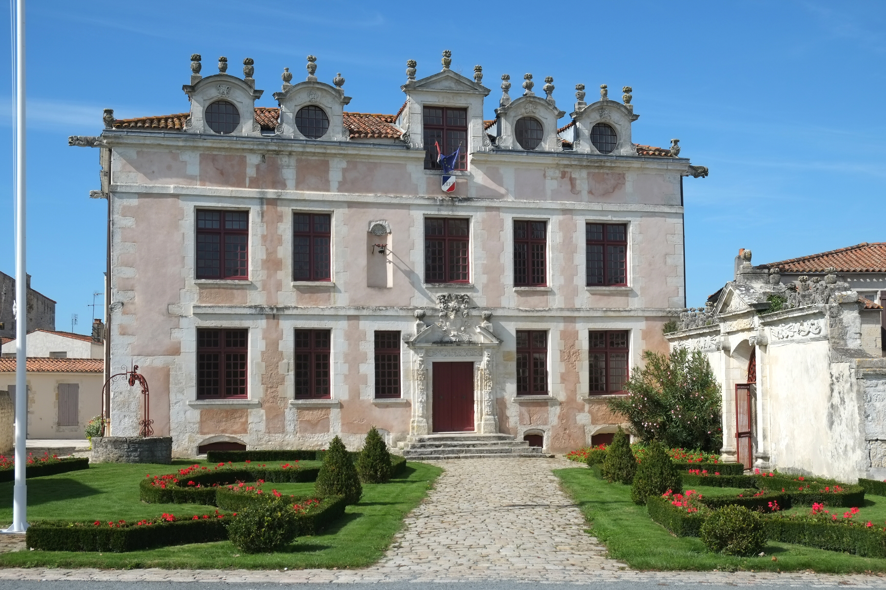 Hôtel des Rohan Soubise Charente-Maritime France